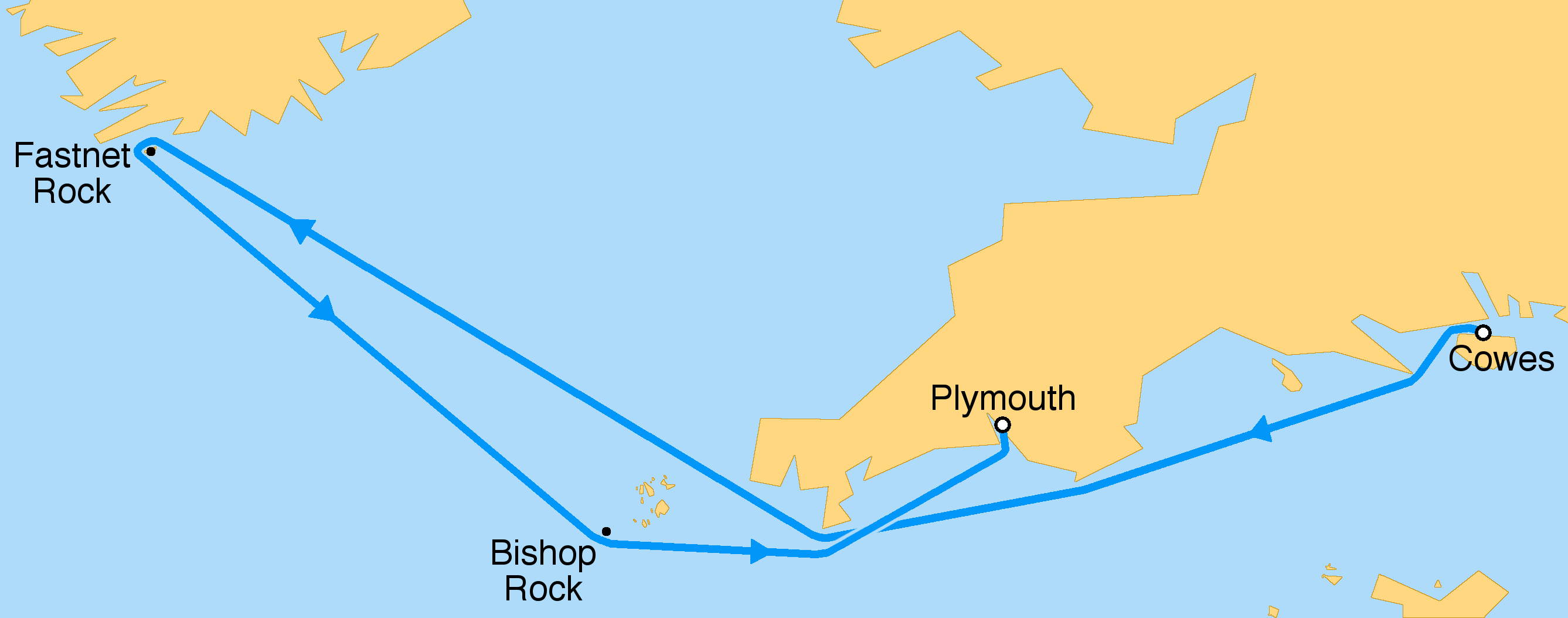 Parcours théorique de la course à la voile Fastnet Race en Manche et mer Celtique. Tracé approximatif des côtes d'après le fichier Commons 1771 Zannoni Map of the British Isles (England, Scotland, Ireland) - Geographicus - BritishIsles-janvier-1771.jpg